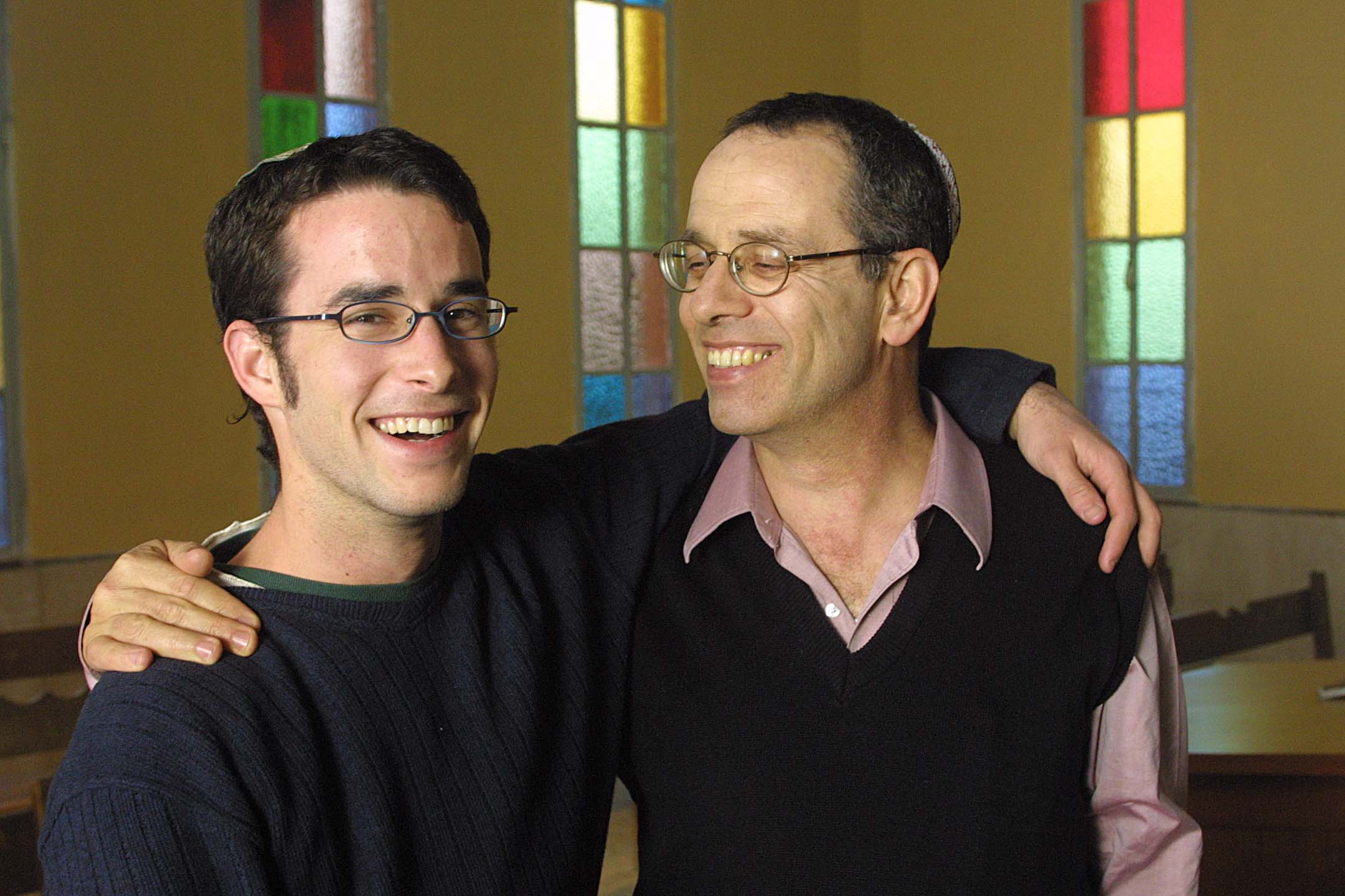 הישיבה סטילס מהפתיח